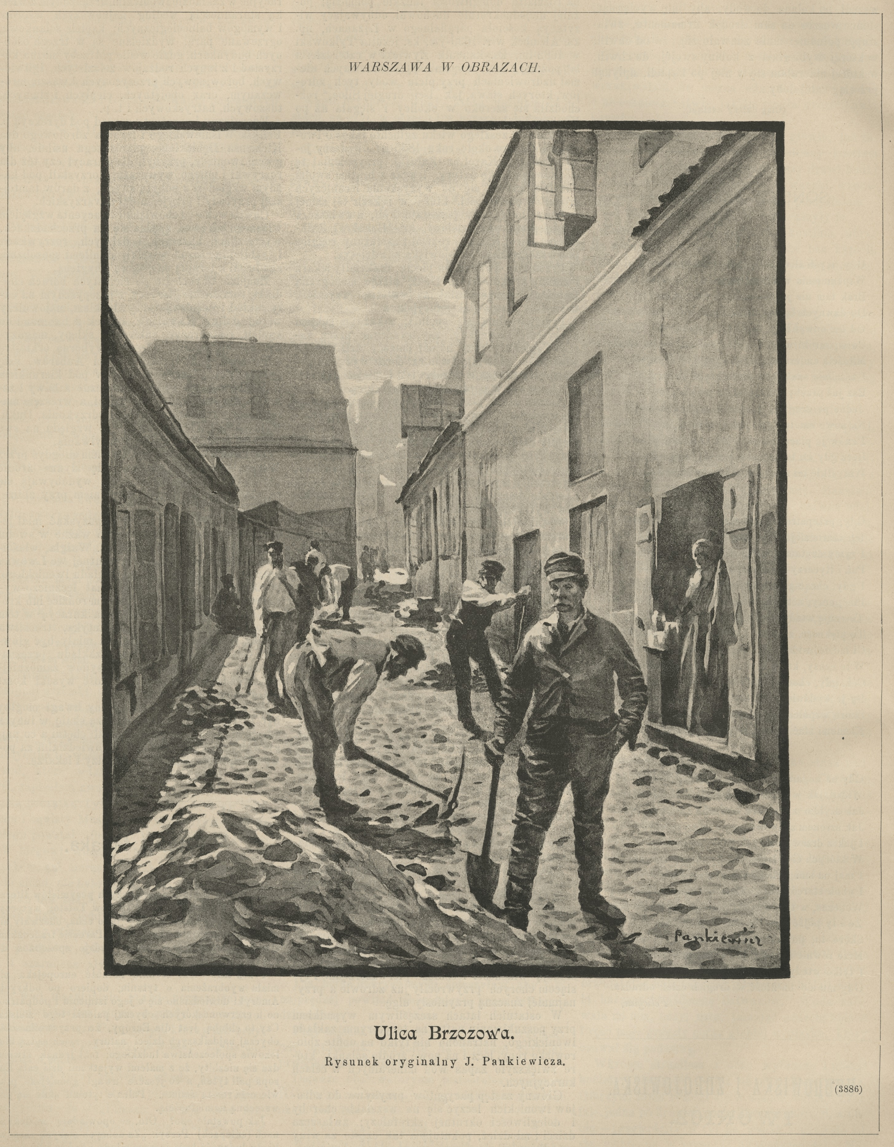 Warszawa w obrazach : ulica Brzozowa